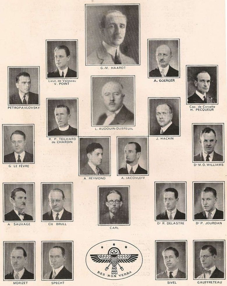 Liste, avec photographie, des principaux membres de la mission Citroën Centre - Asie en 1931 -1932 (Croisière Jaune). En bas, en latin, la devise de Georges-Marie Haardt, le responsable général des deux groupes de l'expédition. Traduction : "Des actes, pas des paroles". Document d'époque, sans précision sur l'origine de sa publication.